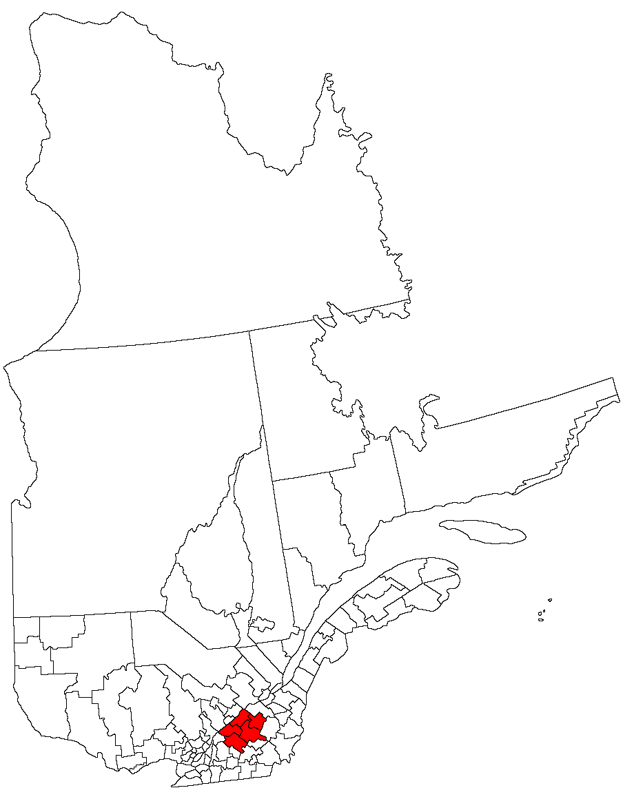 Centre-du-Québec region, Quebec